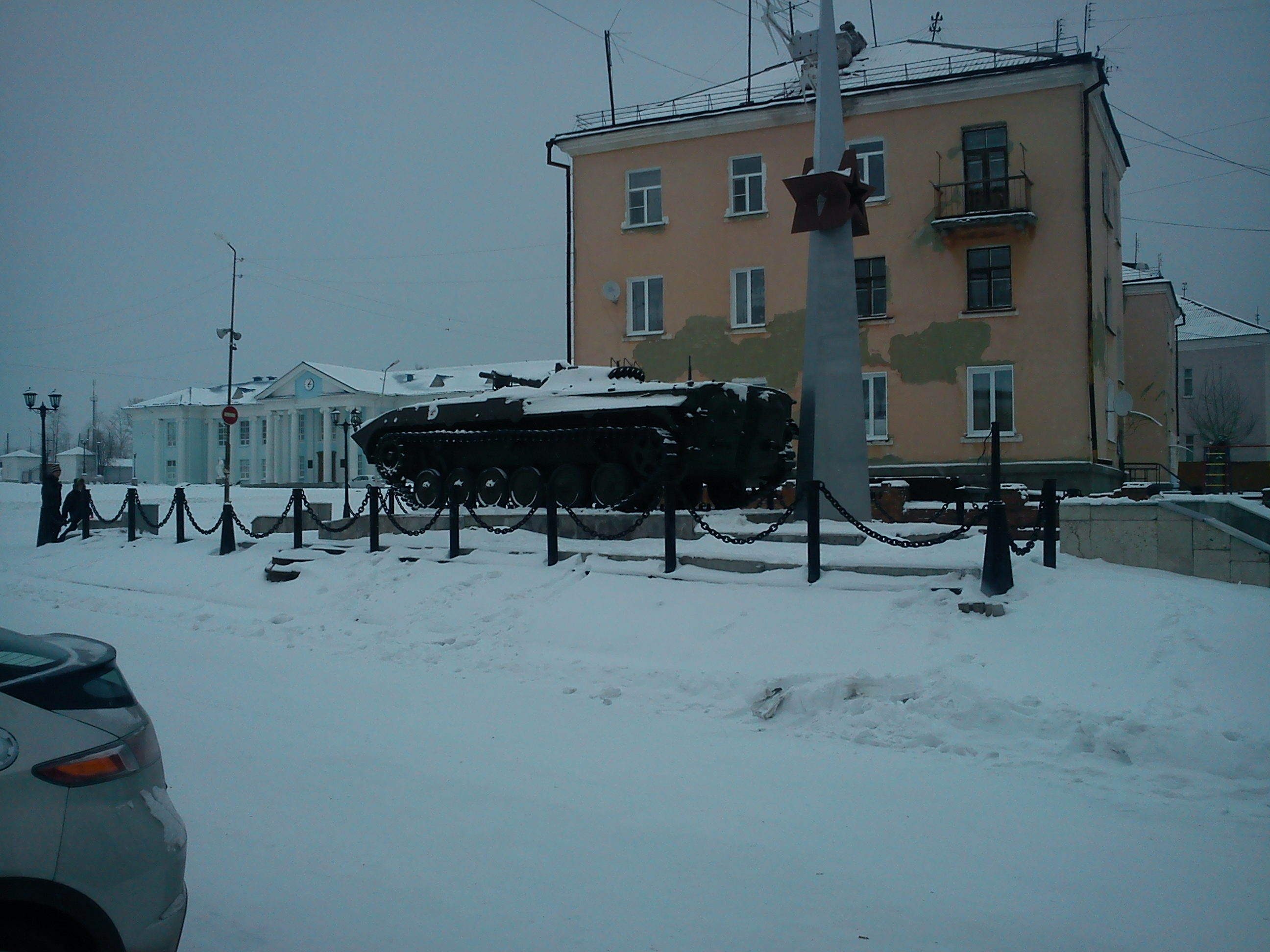 Боевая машина пехоты около Фонтанной площади, город Волчанск (Свердловская область)